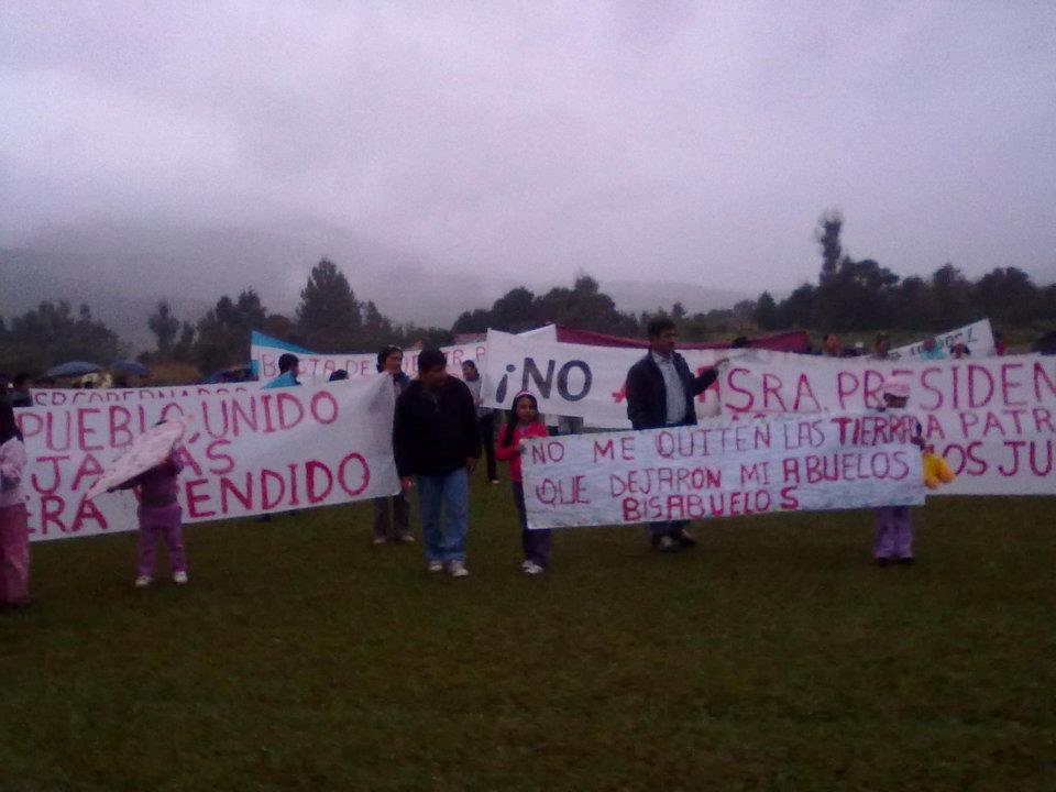 protesta por las denuncias efectuadas